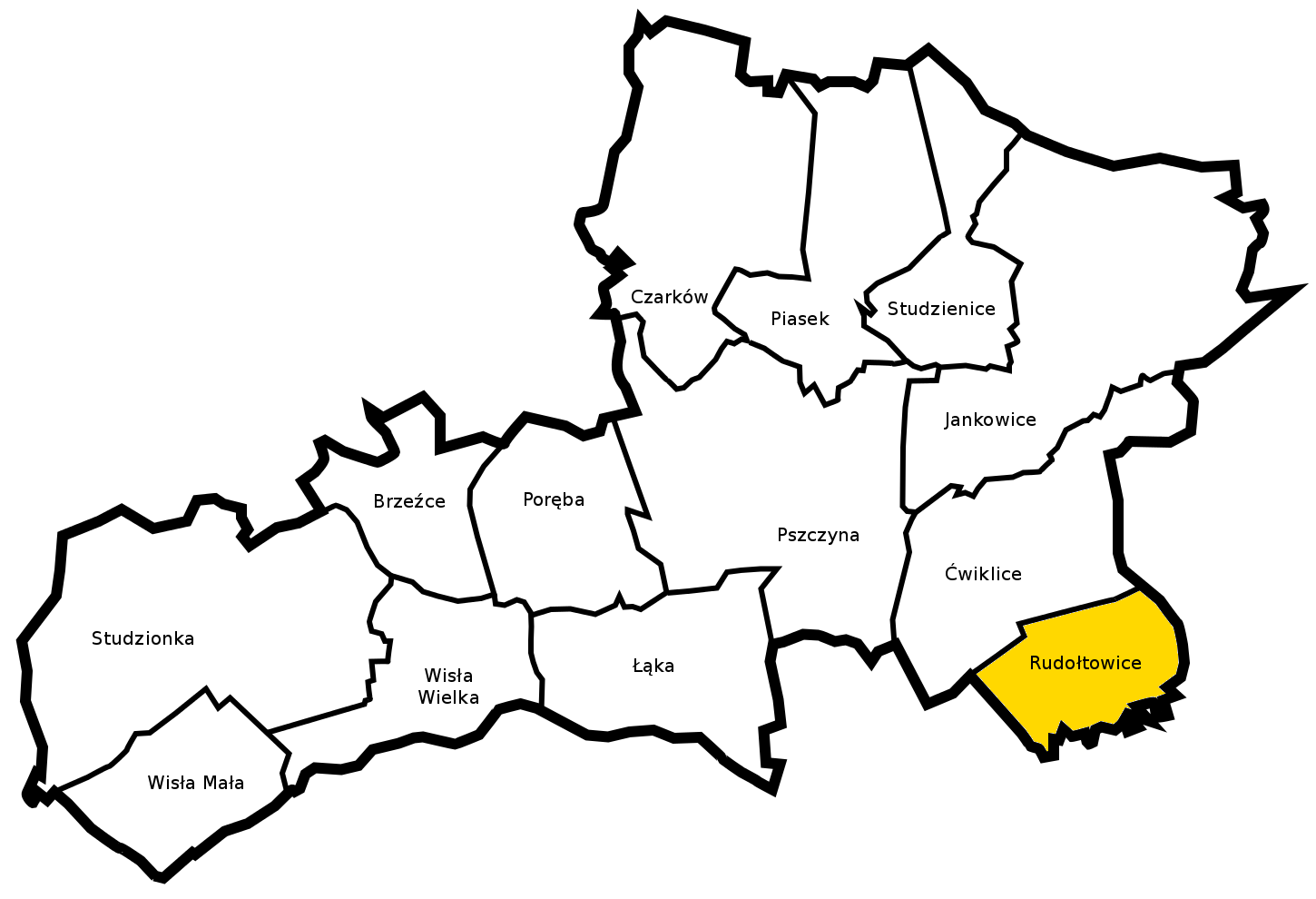 Gmina Pszczyna - sołectwo Rudołtowice